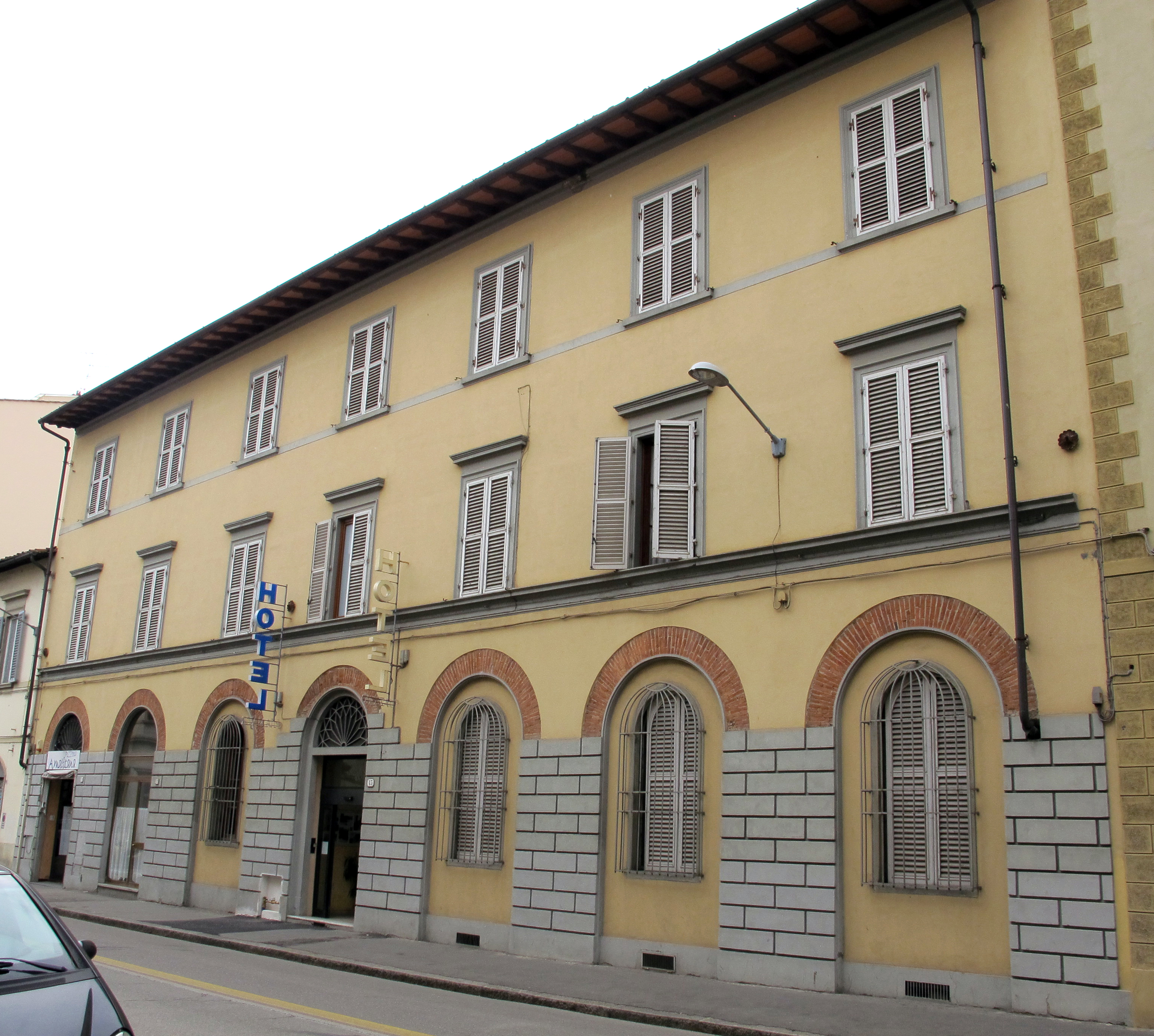 Via della mattonaia 43, casamento dove abitò margheria guidacci